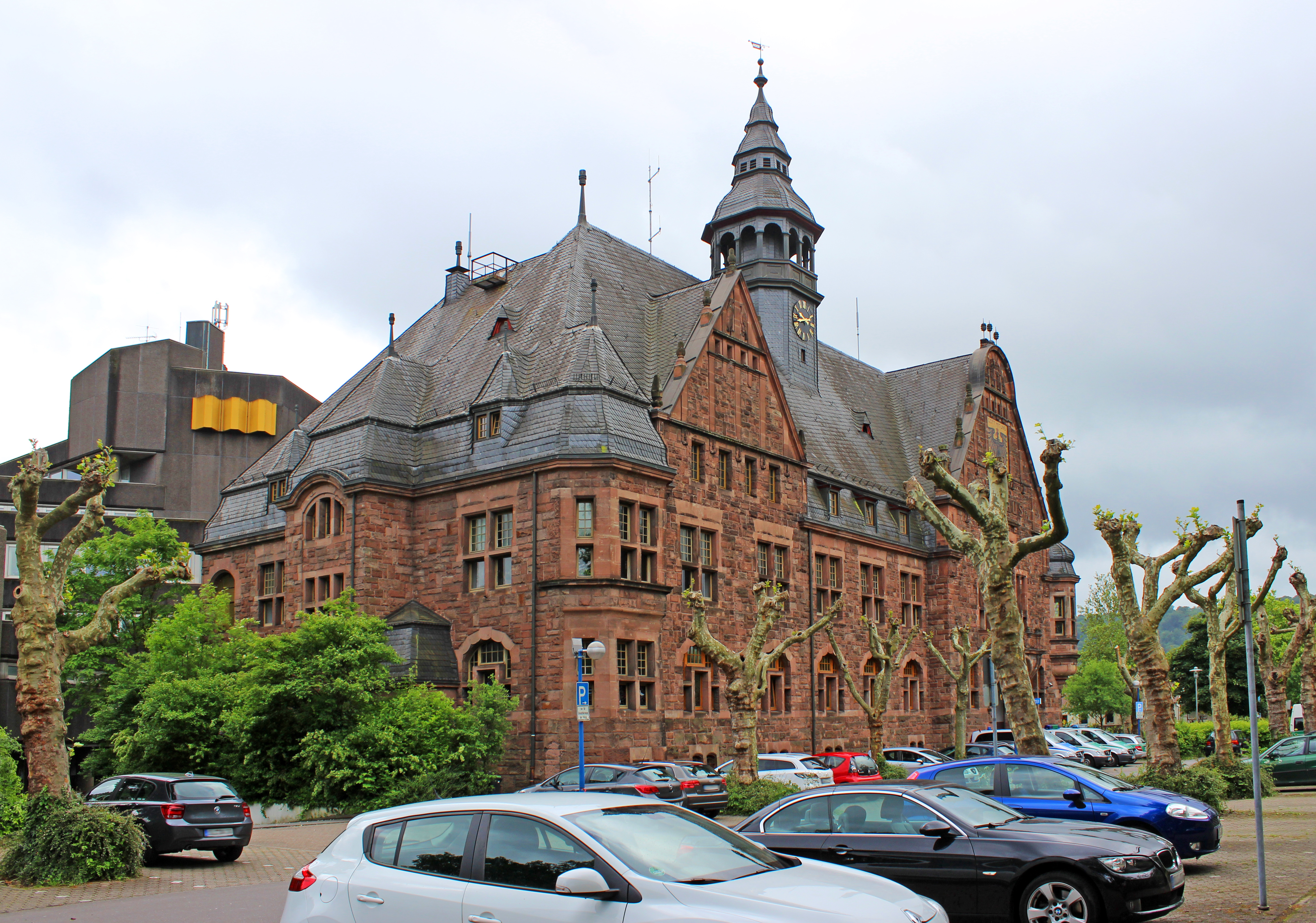 Dillingen, Landkreis Saarlouis, Saarland: Altes Rathaus, heute Polizeiinspektion Dillingen.